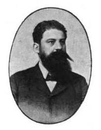 Constantin Stere (1865 - 1936)